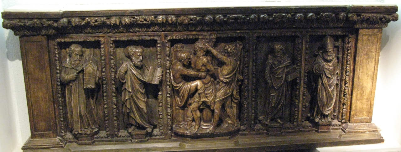 oltar sv.Staša Jurja Dalmatinca u katedrali sv.Dujma u Splitu